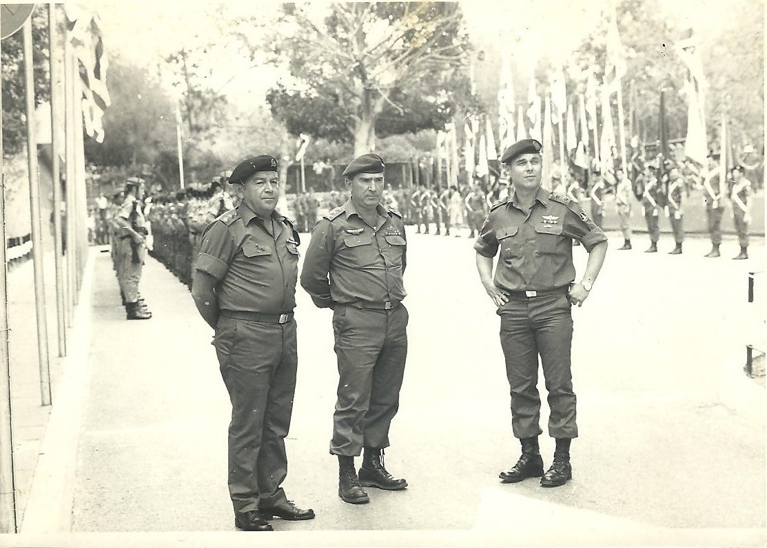 בעת מסדר בבסיס צאלים